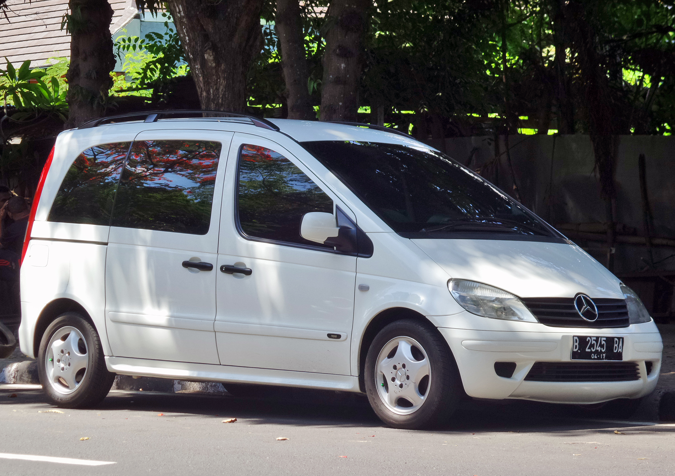 Mercedes-Benz Vaneo